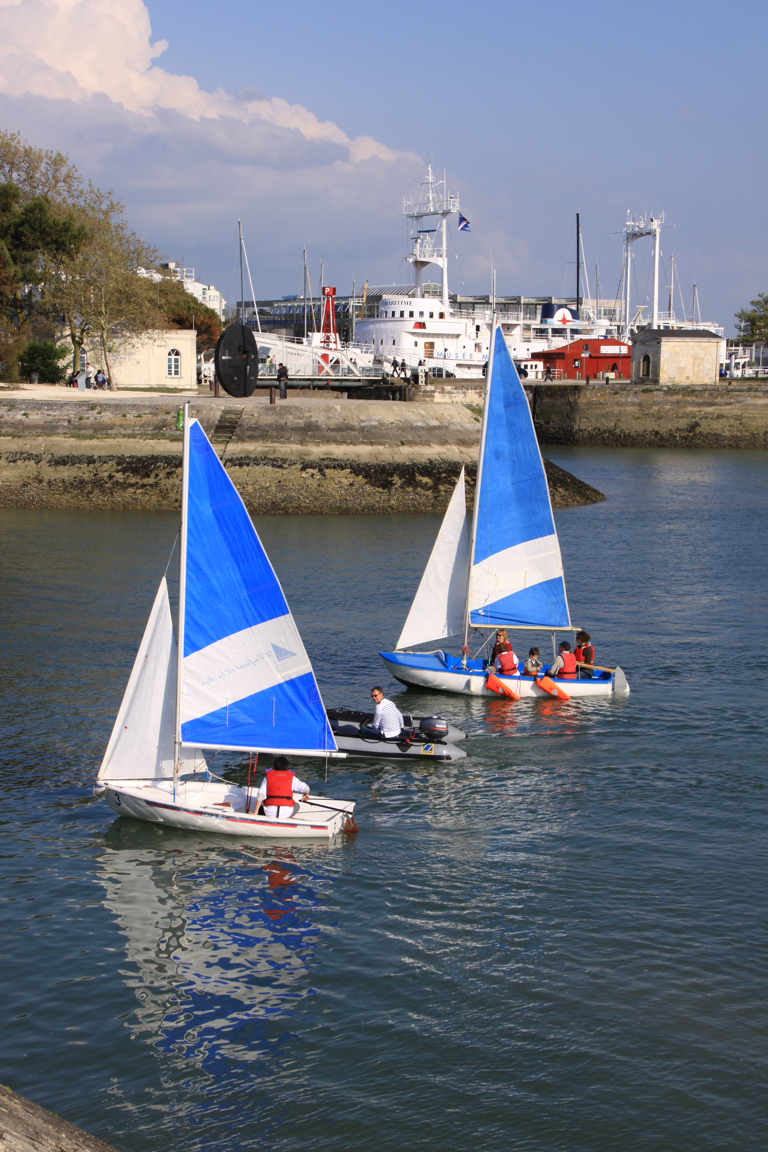 Deux dériveurs légers entrant dans le port de La Rochelle. Ces dériveurs légers sont manoeuvrés par des membres du club de voile "L' Enfant et la Mer" qui viennent de s' entrainer à la navigation à la voile sur dériveur dans la baie de La Rochelle. Le dériveur léger le plus près est un "Cap Sud", l' autre est une caravelle. Entre les deux bateaux, on peut voir un canot pneumatique (un Zodiac) barré par un moniteur de voile. La Rochelle, Charente Maritime, France.